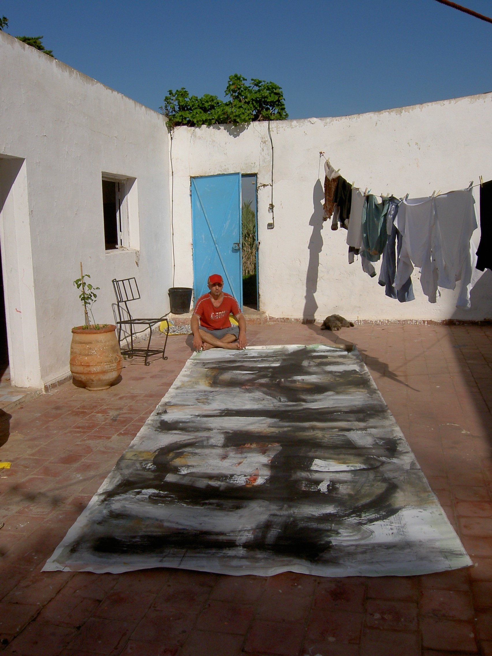 роланд шаламберидзе в Сиди Мусса (Мороко)